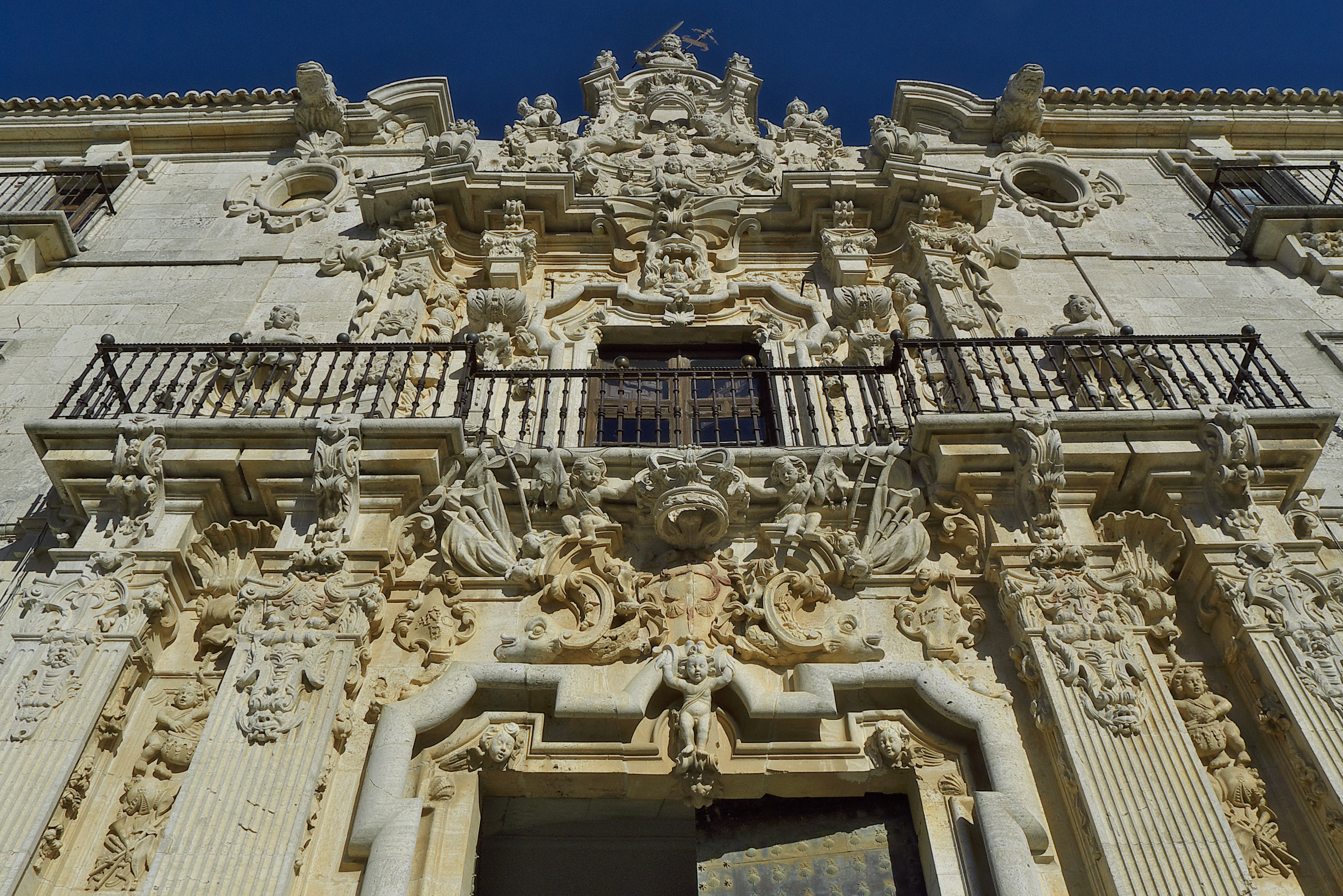 Detalle de la portada situada en la fachada meridional del Monasterio de Uclés. Pedro de Ribera (1735)